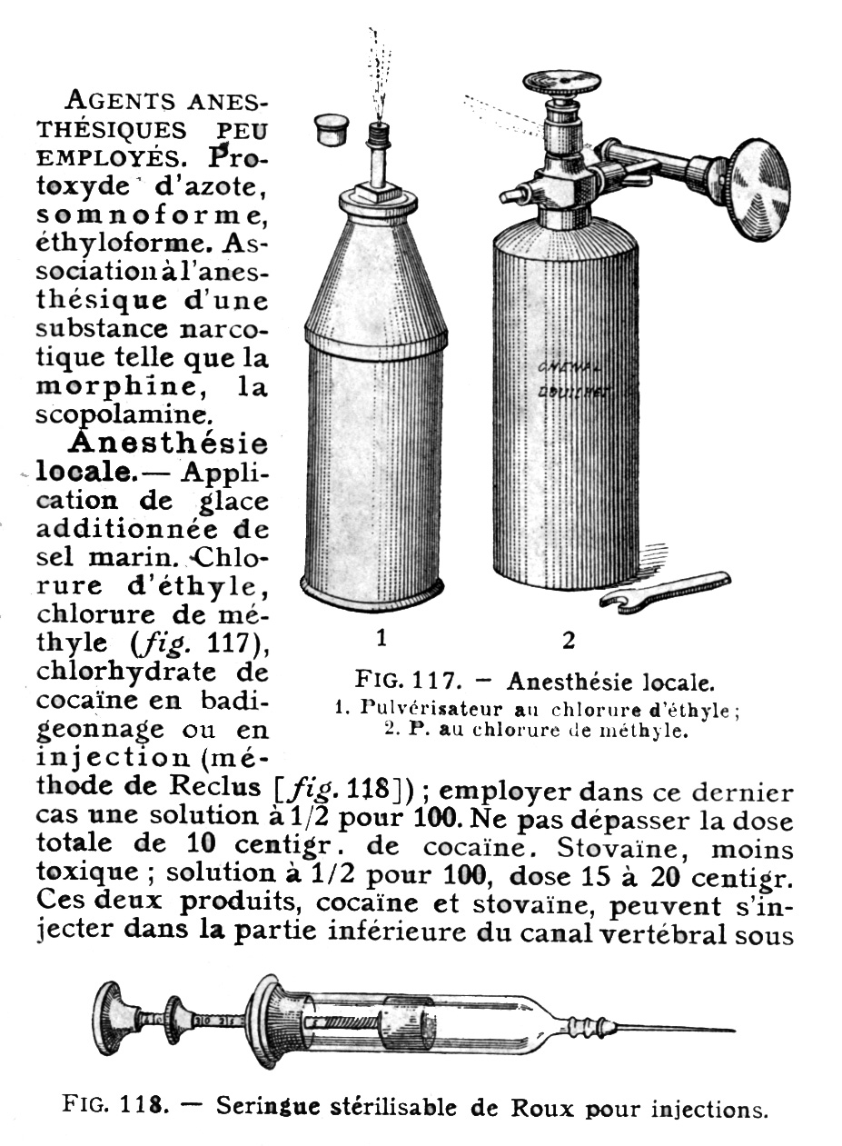 117 1 Pulverisateur au chlorure d'ethyle 2 P. chlorure de méthyle 118 Seringue stérillable de Roux pour injections